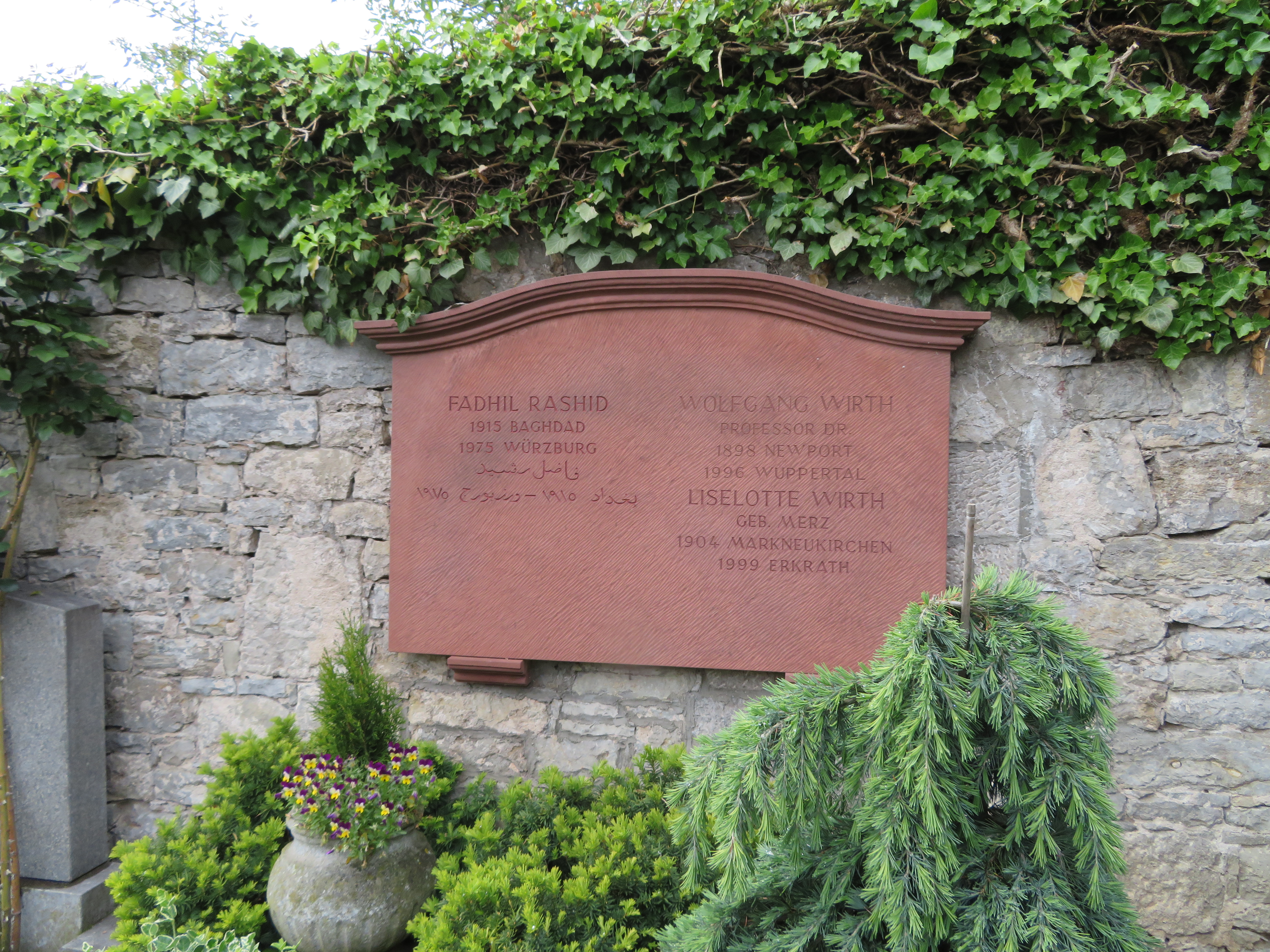 interessant belegtes Grab